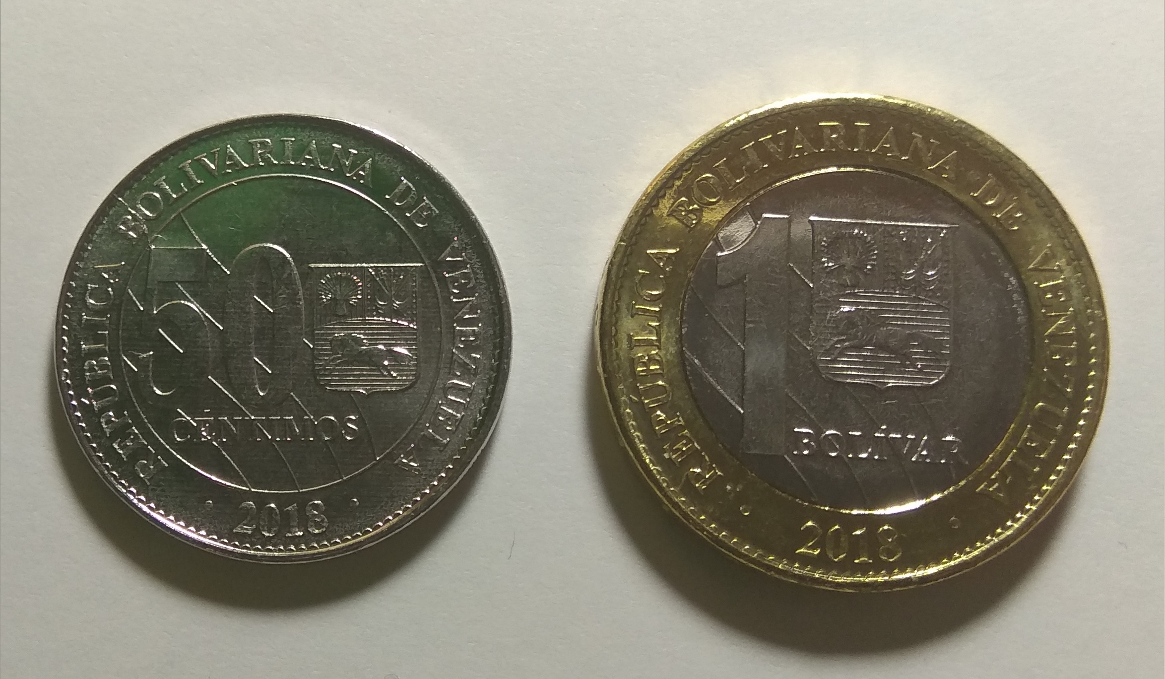 Obverse of 50 centimos and 1 Bolivar